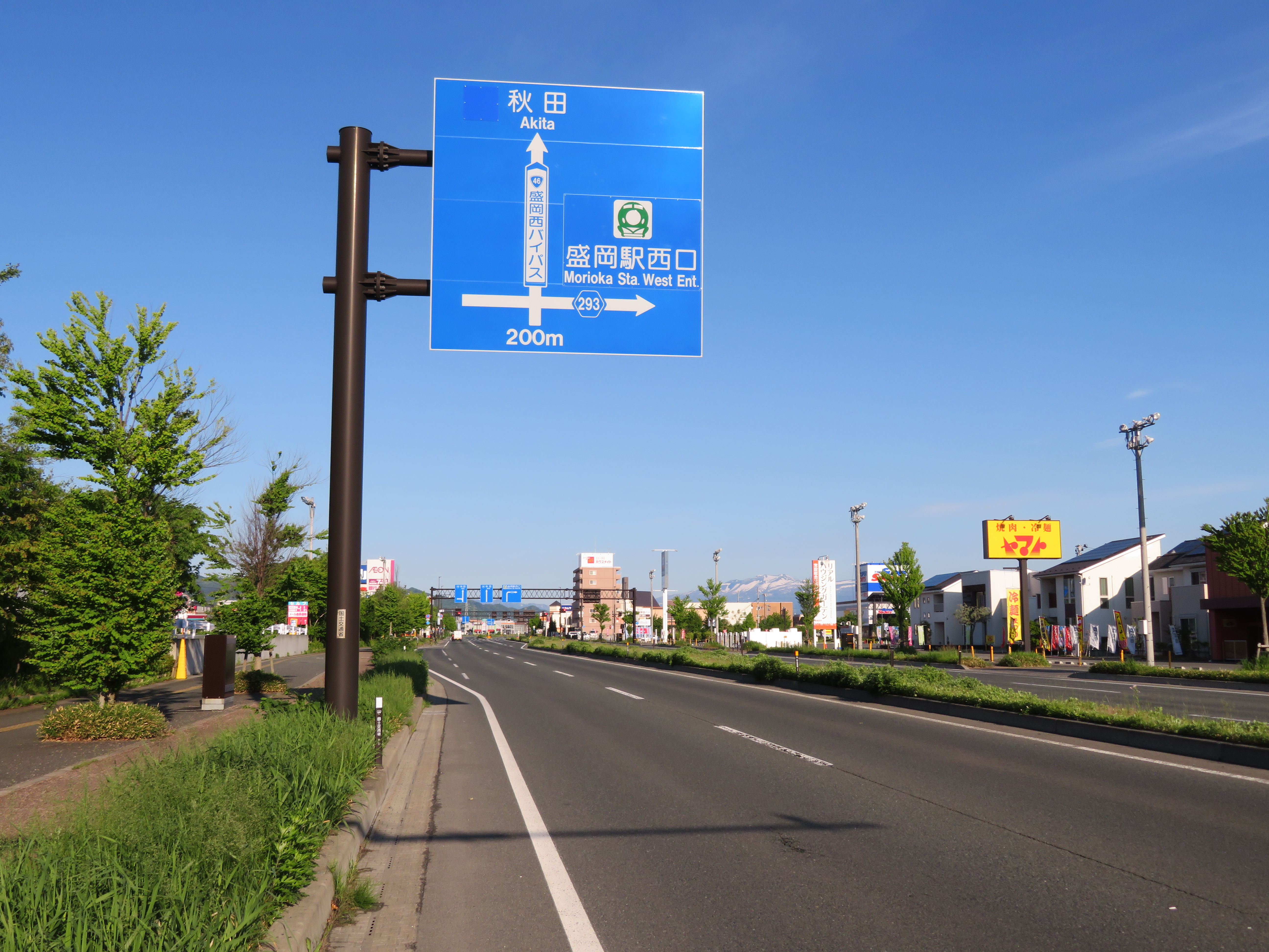 国道46号線盛岡西バイパス 岩手県盛岡市本宮４丁目付近（雫石方面を撮影） Canon PowerShot SX720 HS